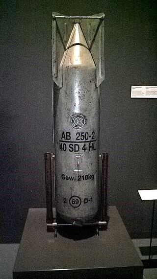 Niemiecka bomba kasetowa AB 250 eksponowana w Muzeum II Wojny Światowej w Gdańsku.